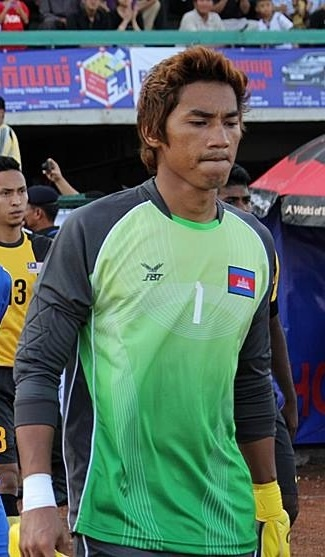 Sou yaty